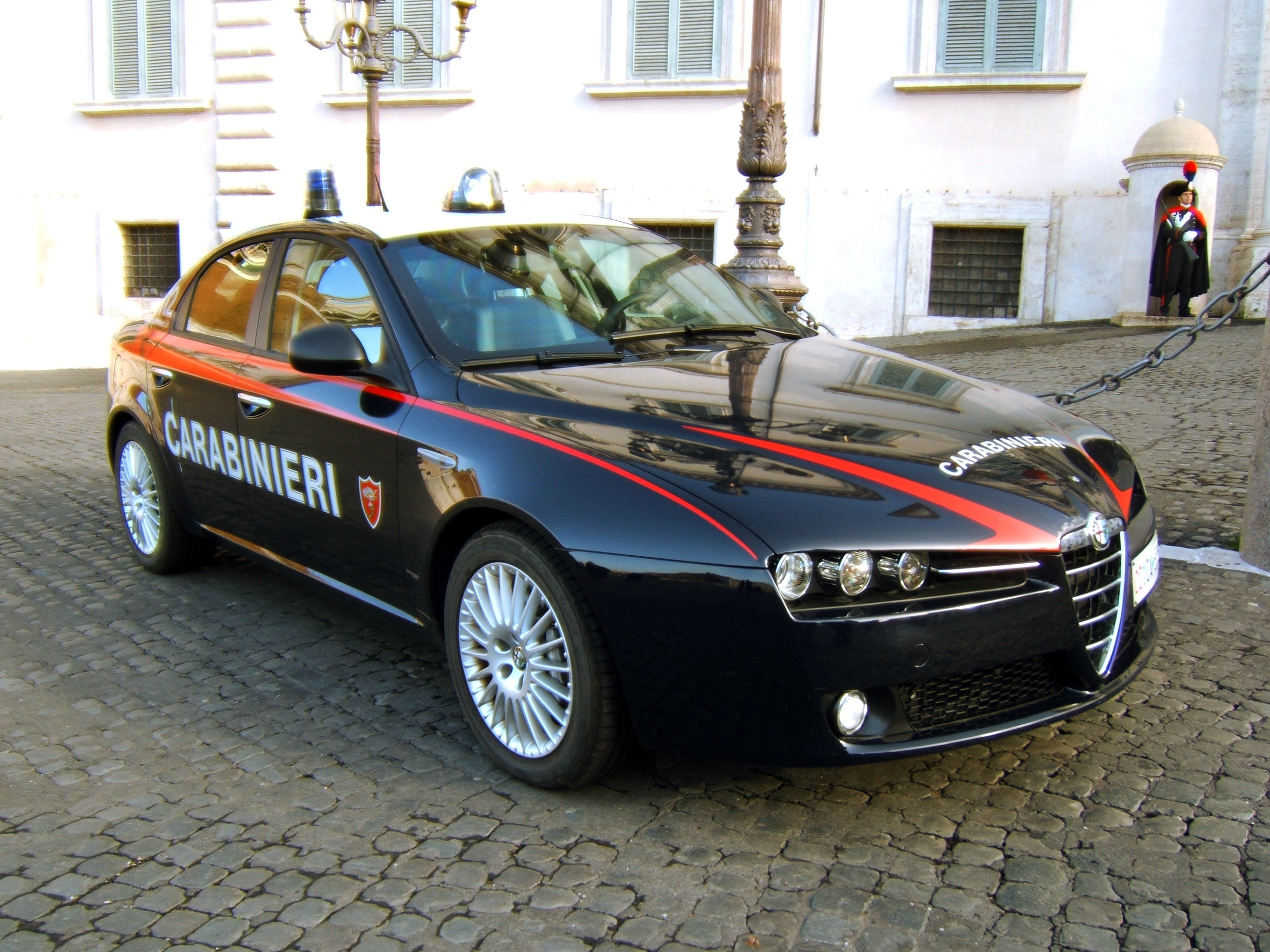 Une Alfa-Romeo 159 des carabiners romains devant le palais de la présidence de la république italienne.